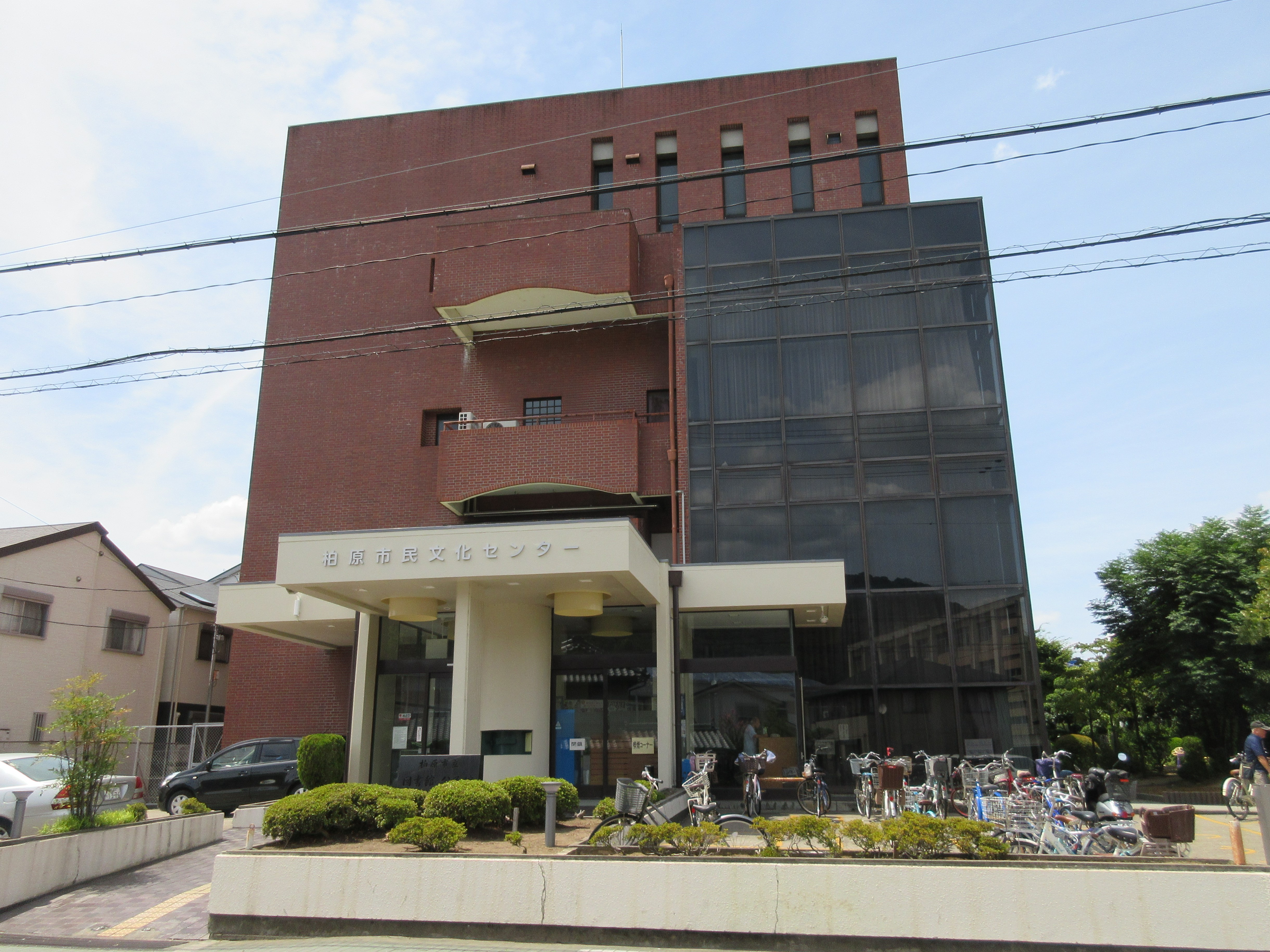 柏原市立柏原図書館